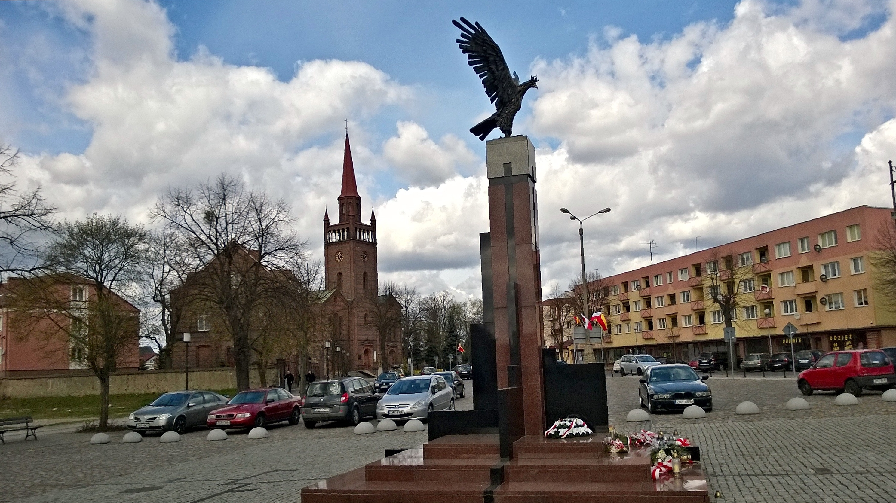 Dębno